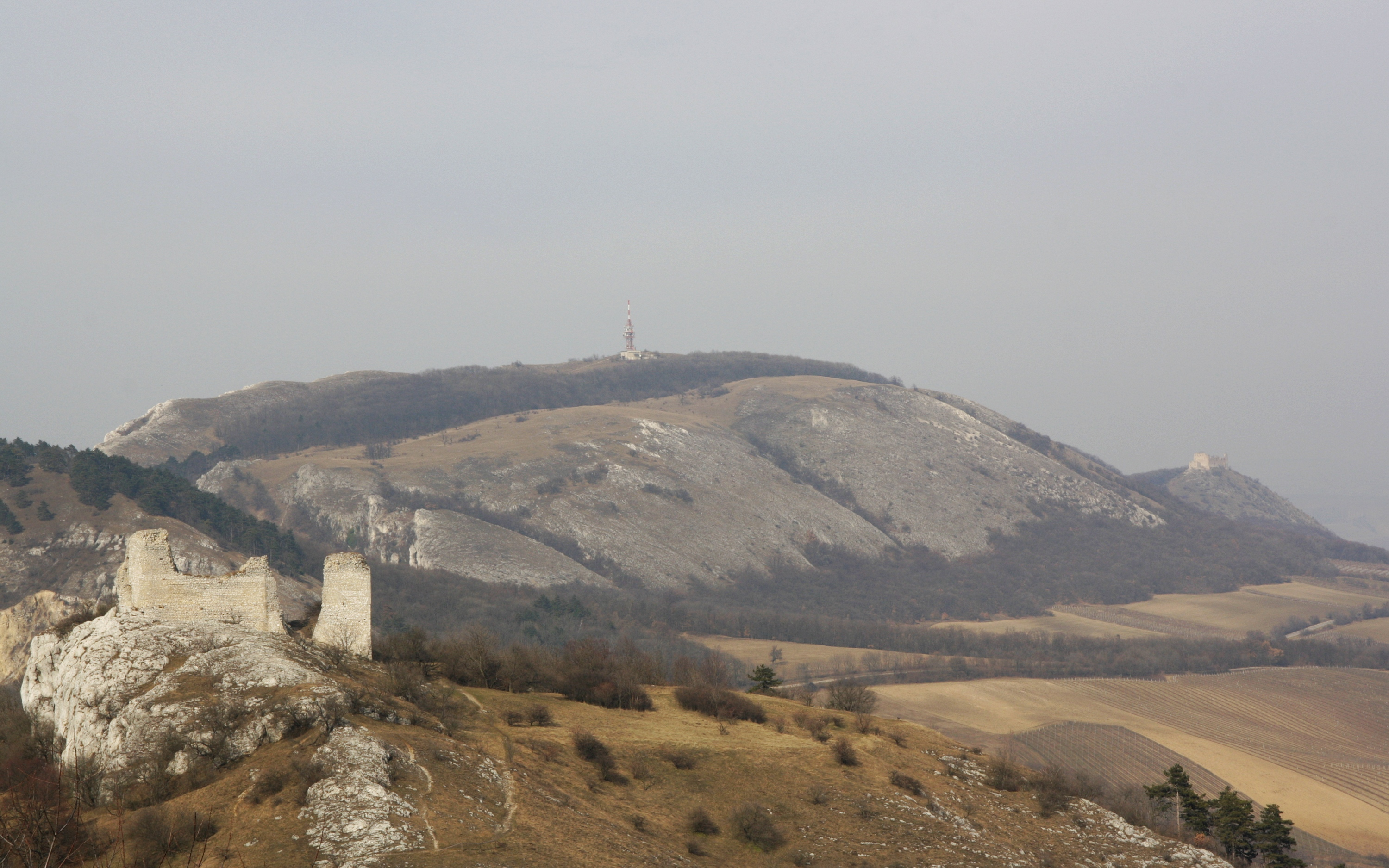 Pohled na Děvín a Sirotčí hrádek ze Stolové hory.